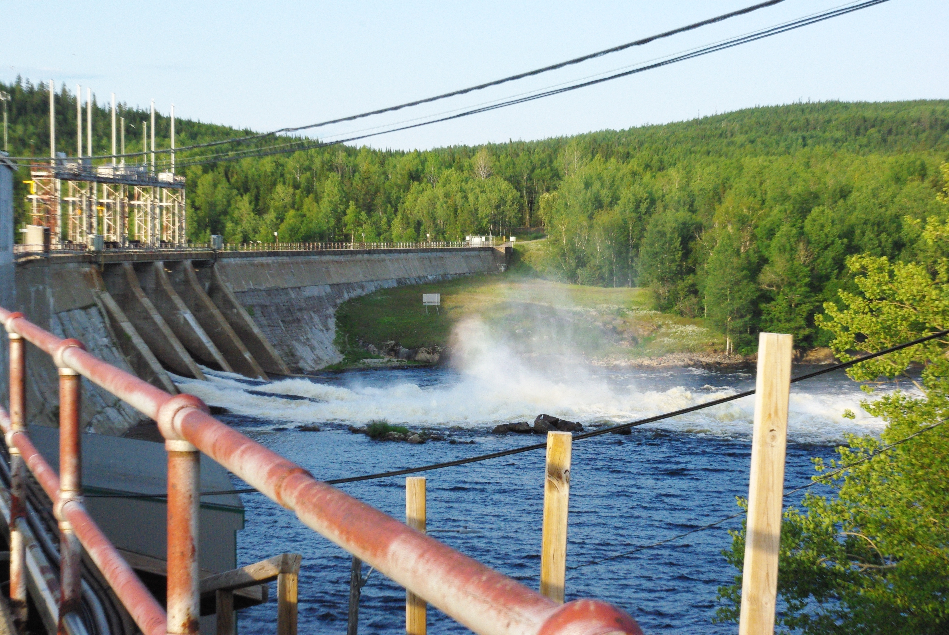 Expédition canot jeunesse Tapiskwan Sipi 2019